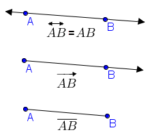 Права, полуправа, отсечка - означување